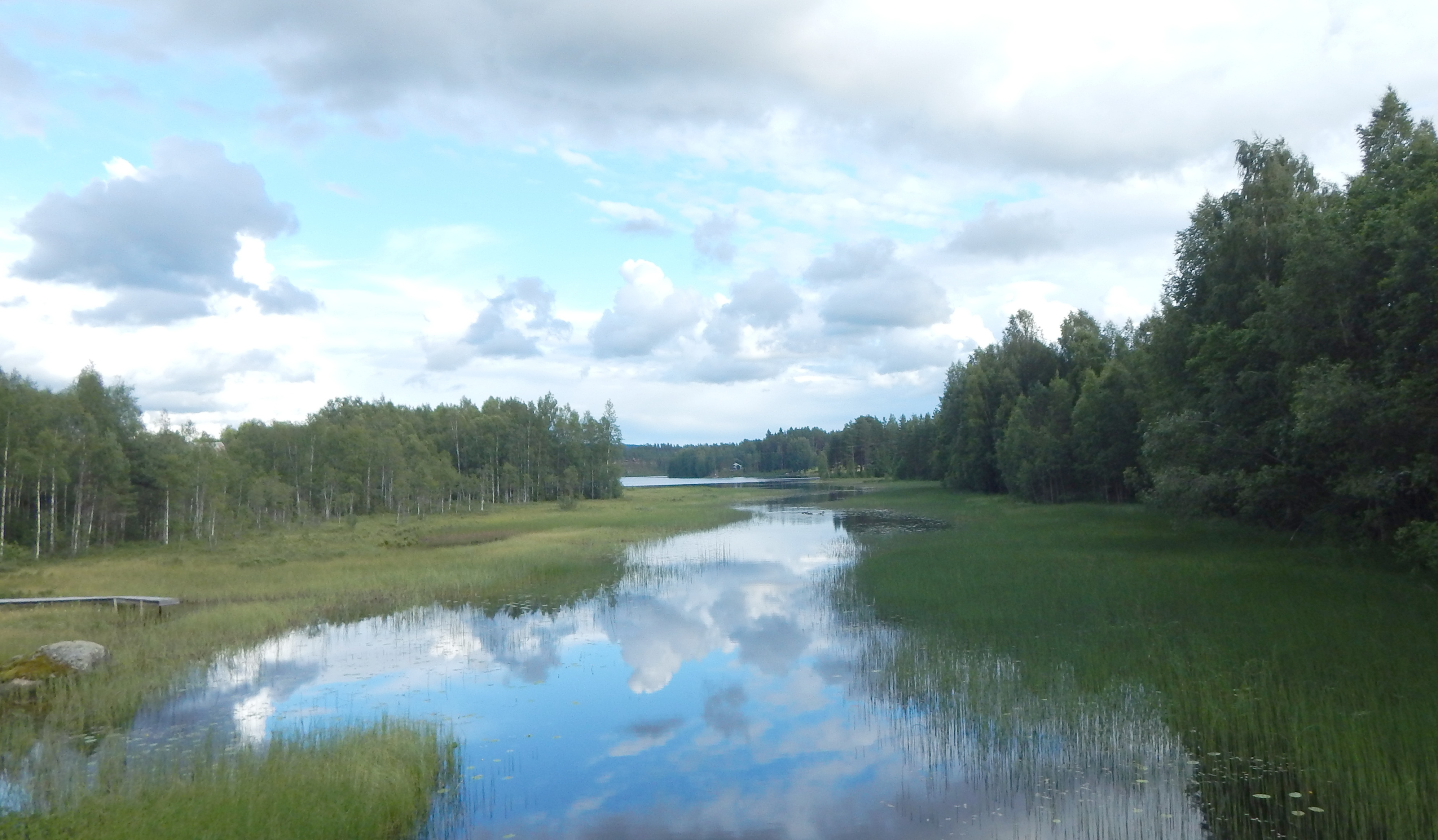 Harasjøen i Stange